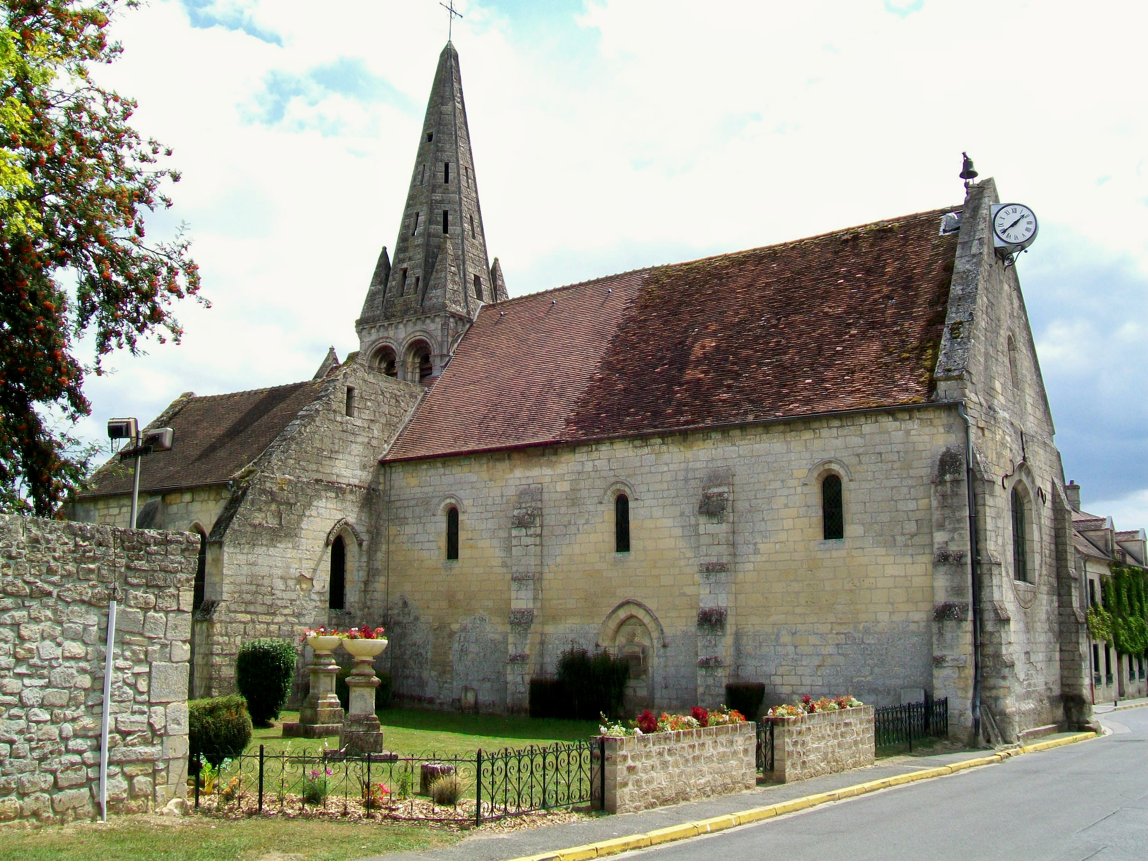 L'église Saint-Denis du XIIIe et XVIe siècle, rue de l'Église ; façade nord essentiellement romane.